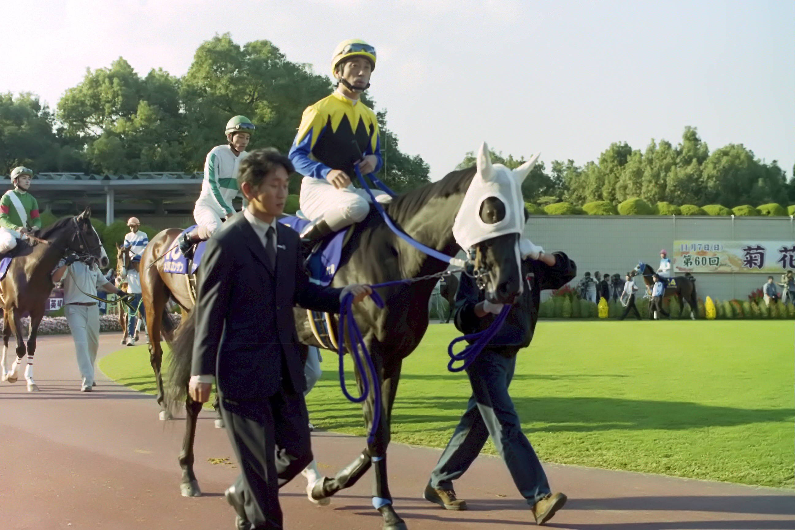 第60回菊花賞のパドックで、9番ブラックタキシード号と的場均騎手を撮影したもの。